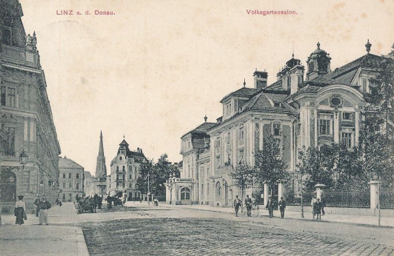 Linz, Volksgartenstraße mit Volksgartensalon (1909)